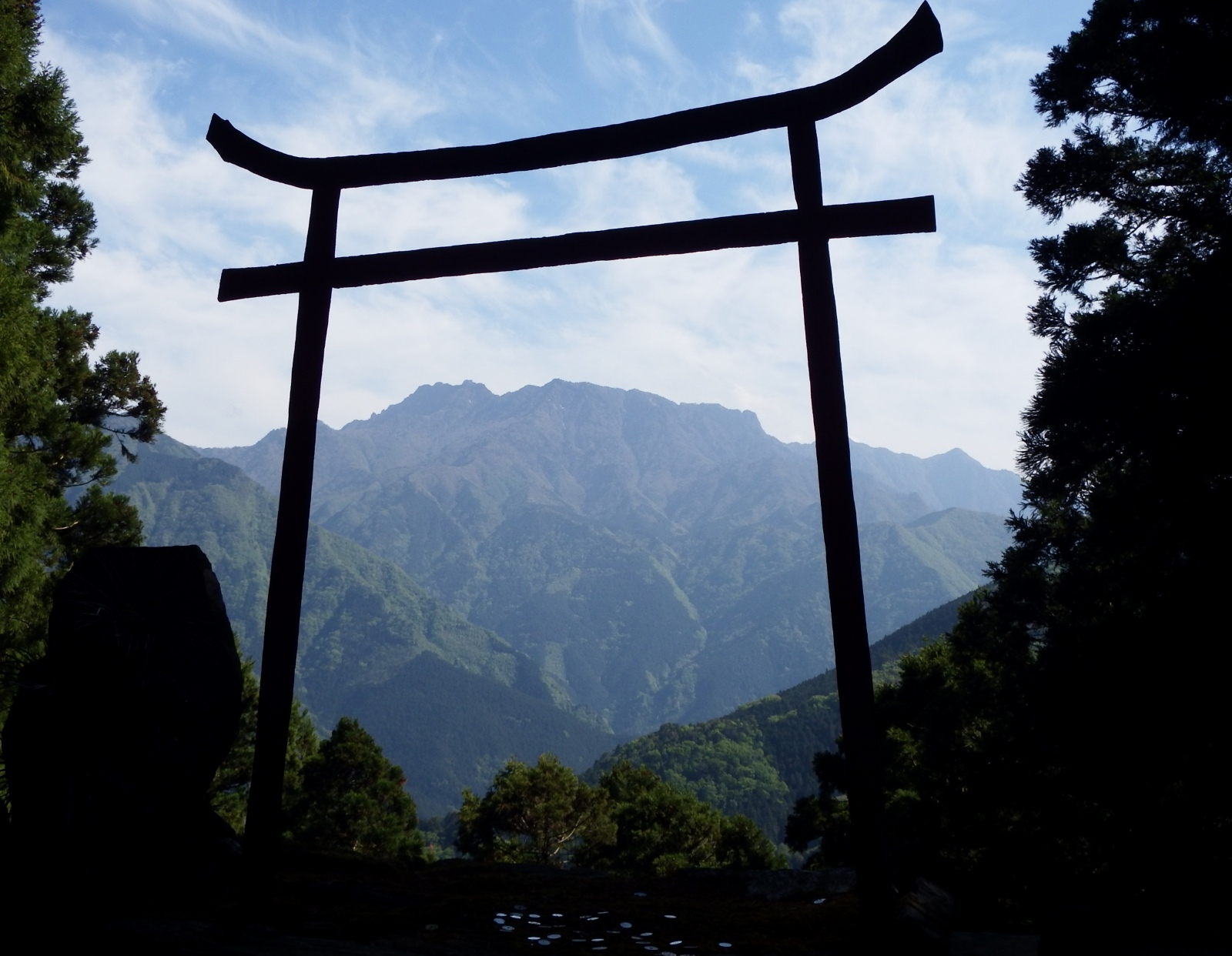 石鎚山を星ガ森から遥拝